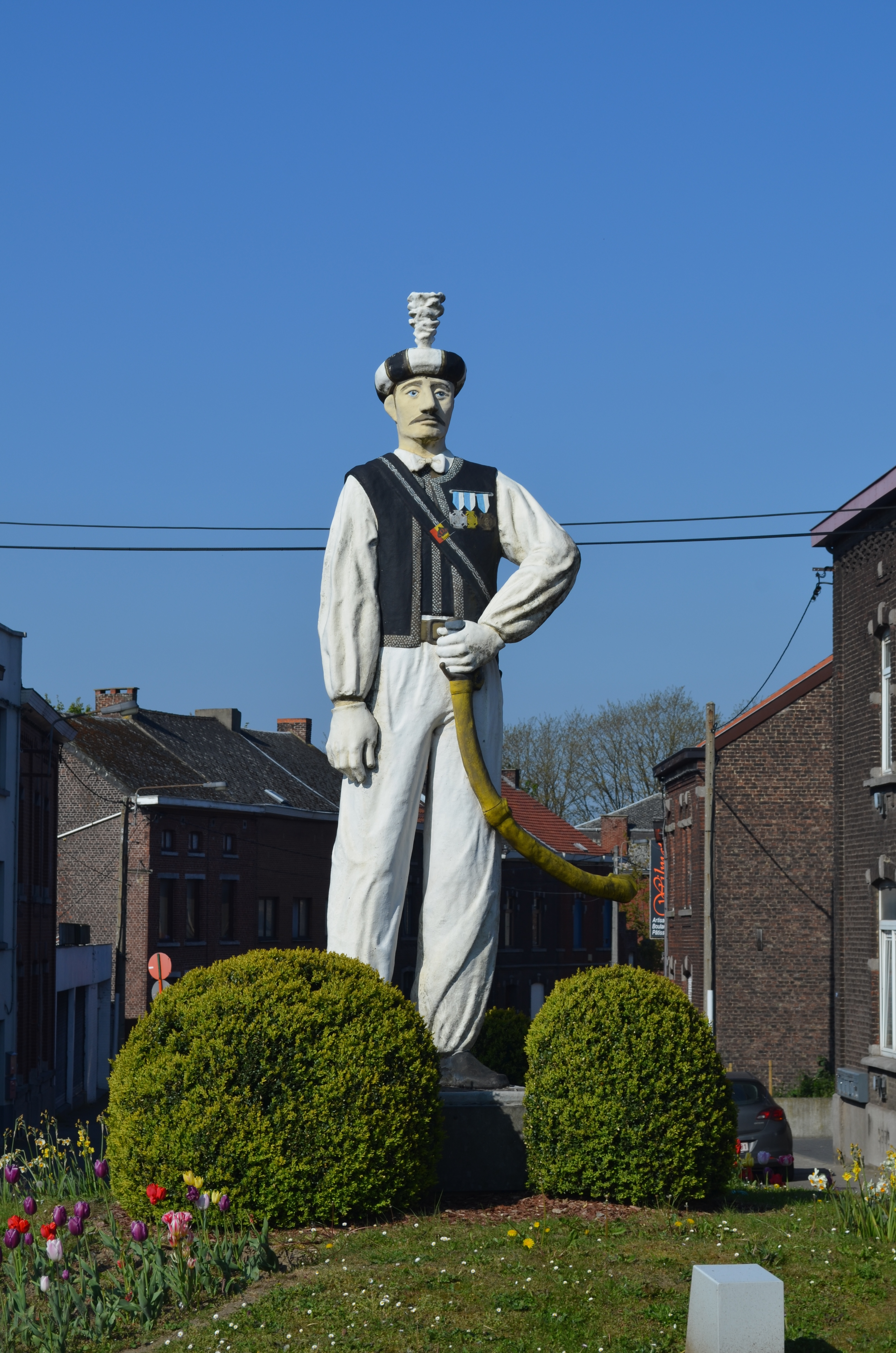 Jumet (Charleroi-Belgique) - Le Mamelouk. Les mamelouks sont un des groupes du tour de la Madeleine qui est à la fois une procession religieuse et une marche folklorique.